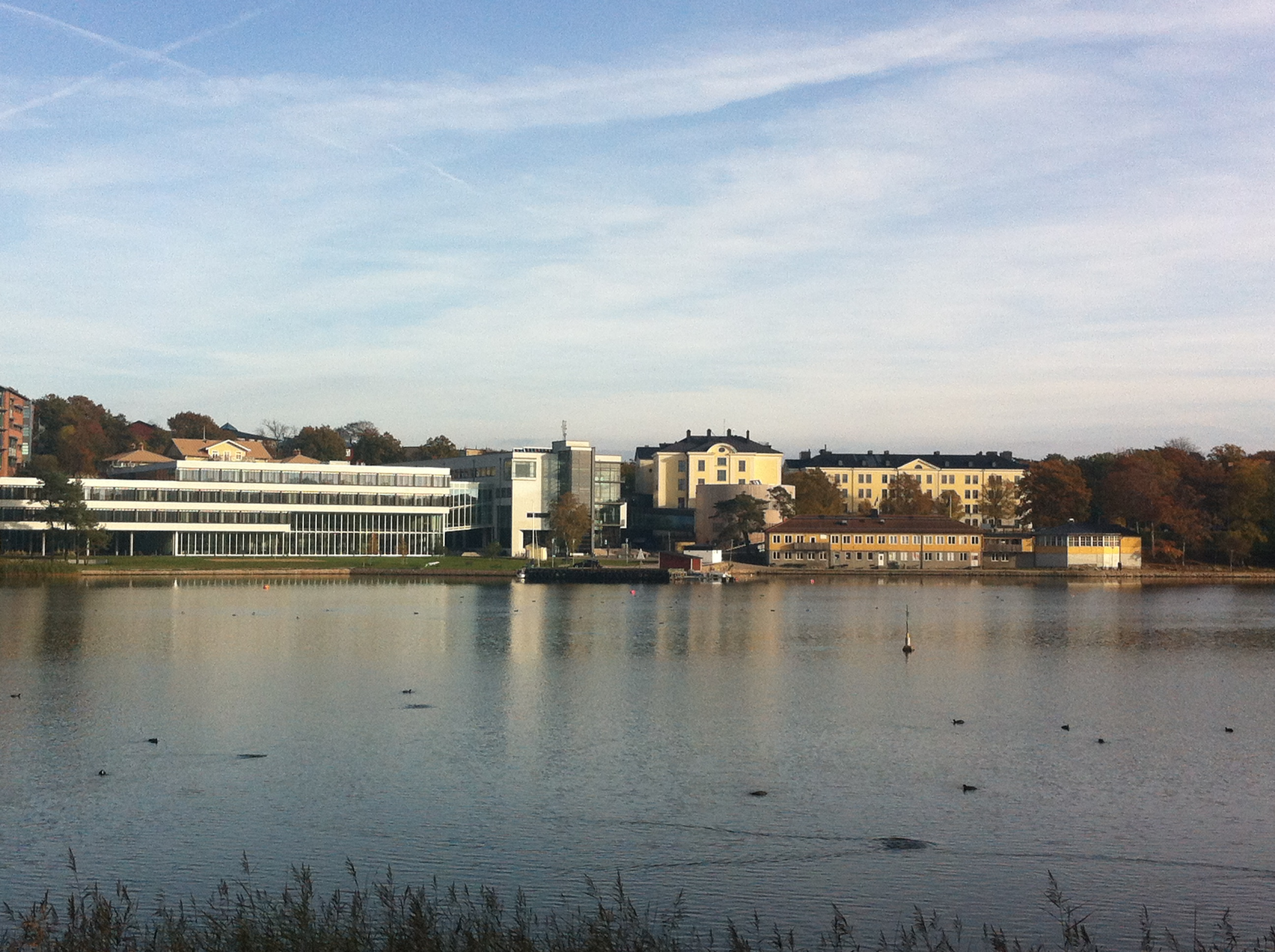 Del av Campus Gräsvik, sett från Långö.